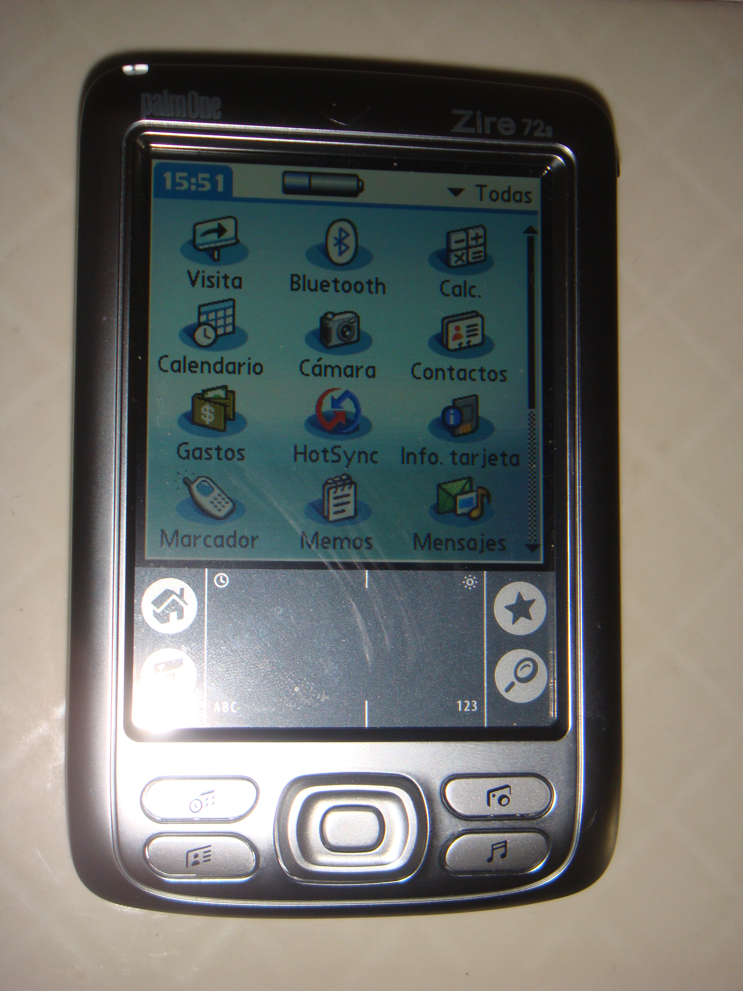 PAD Palm